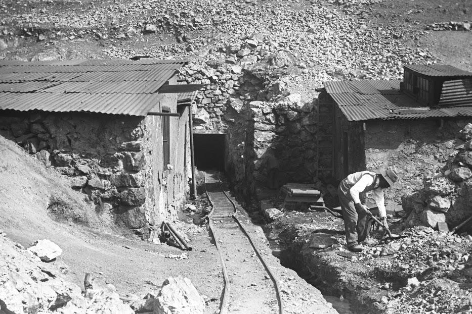 Entrée de la mine de Huaron 1913 Photo sur plaque de verre de Louis GASCUEL